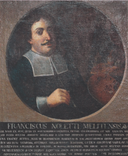 Anonimo, "Ritratto celebrativo di Francesco Noletti", olio su tela. Valletta, Foundation for International Studies